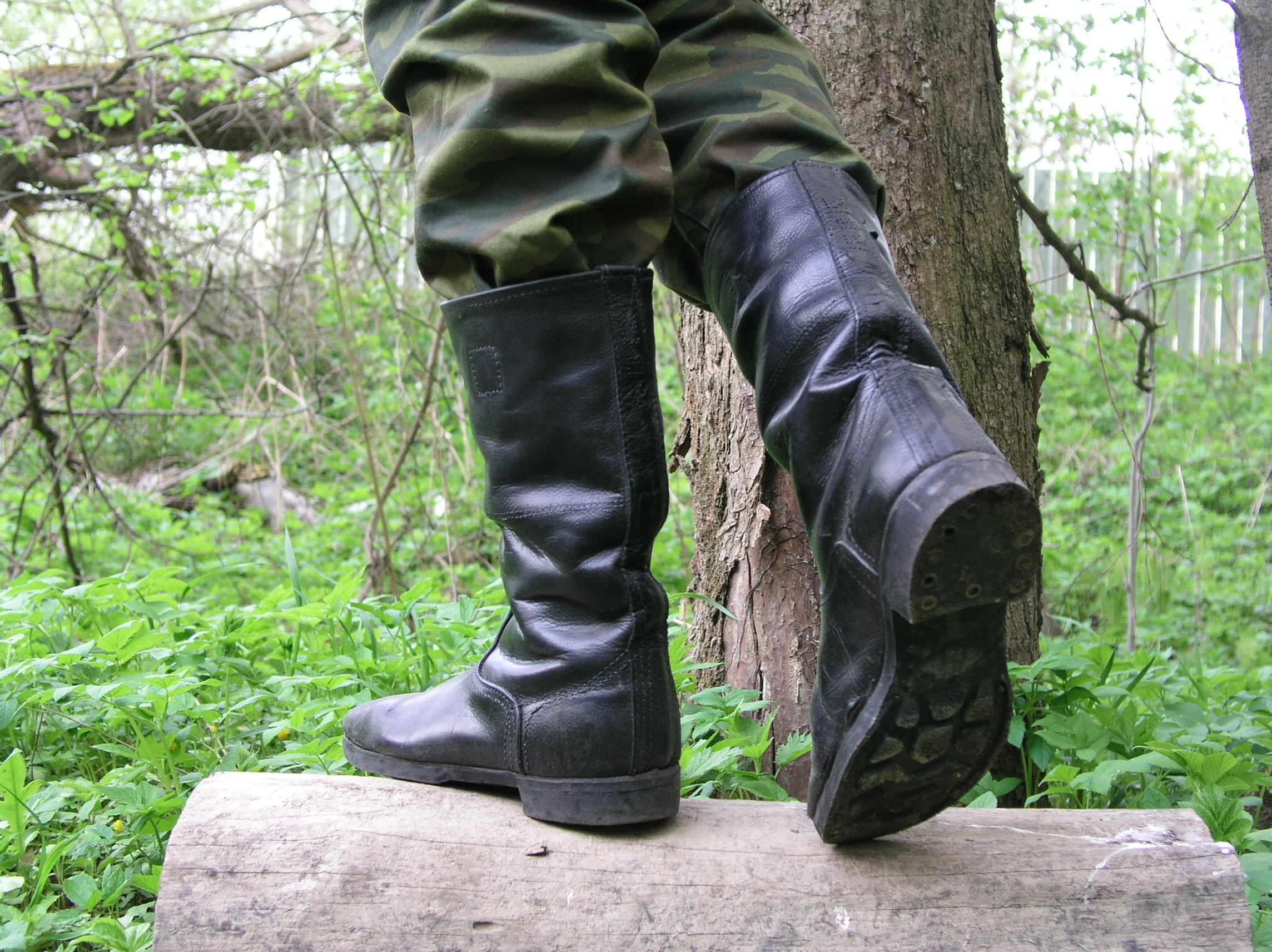 Юфтевые армейские уставные сапоги